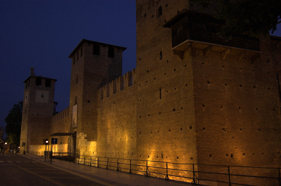 Castello scaligero di Verona